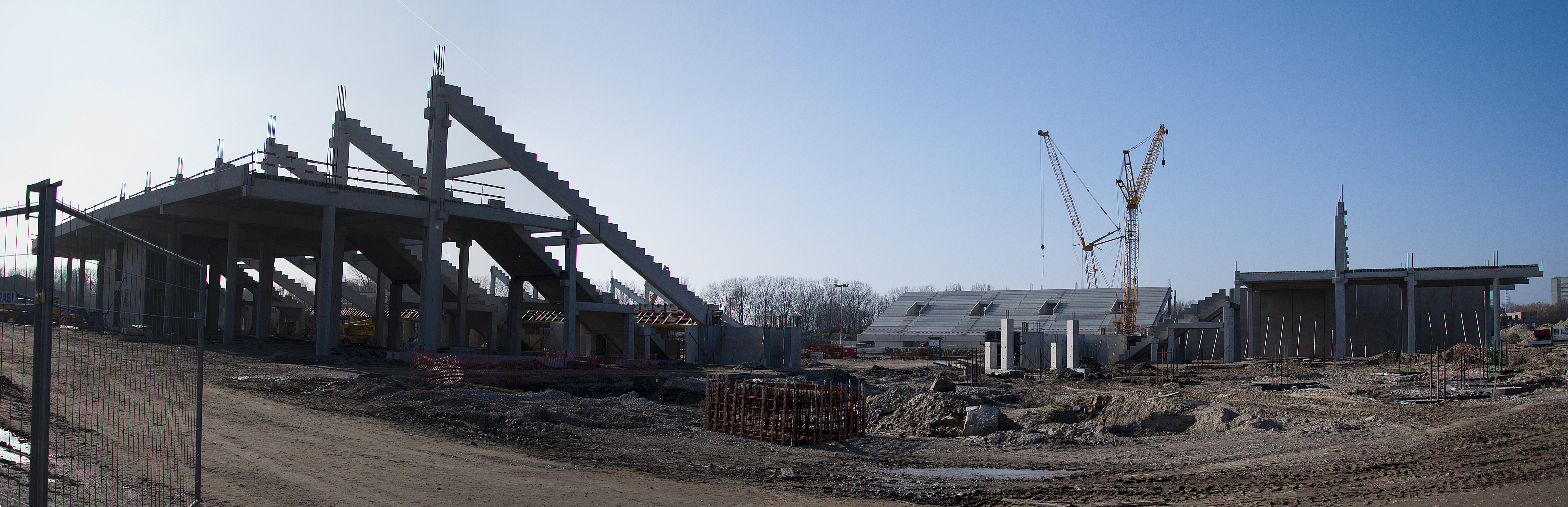 De Ghelamco-Arena in opbouw te Gent, België